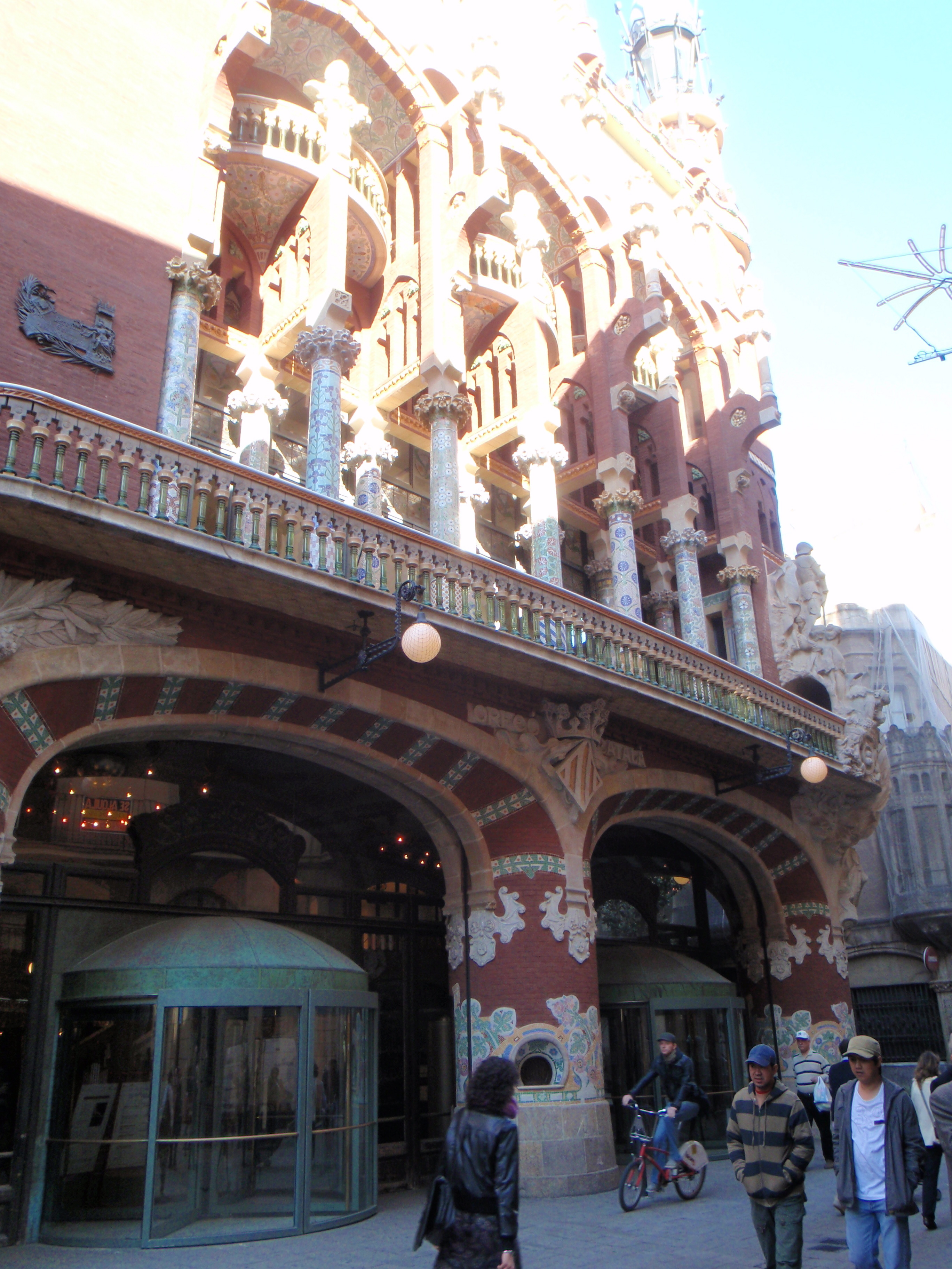 Palau de la Musica Catalana, Barcelona, Arkitekt: Lluís Domènech i Montaner